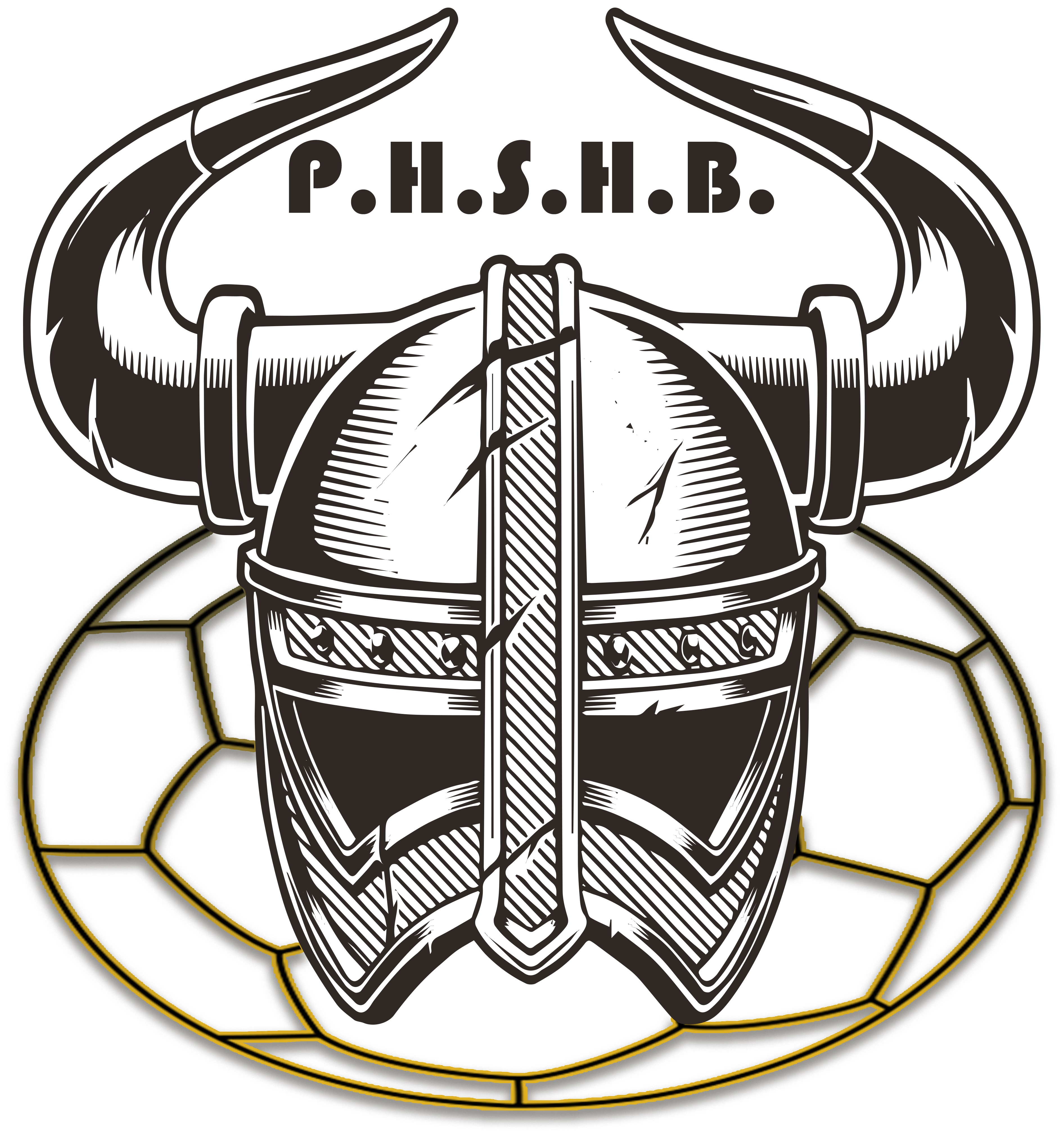 Logo P.H.S.H.B.